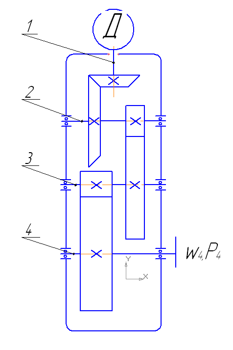 Кмнематическая схема редуктора